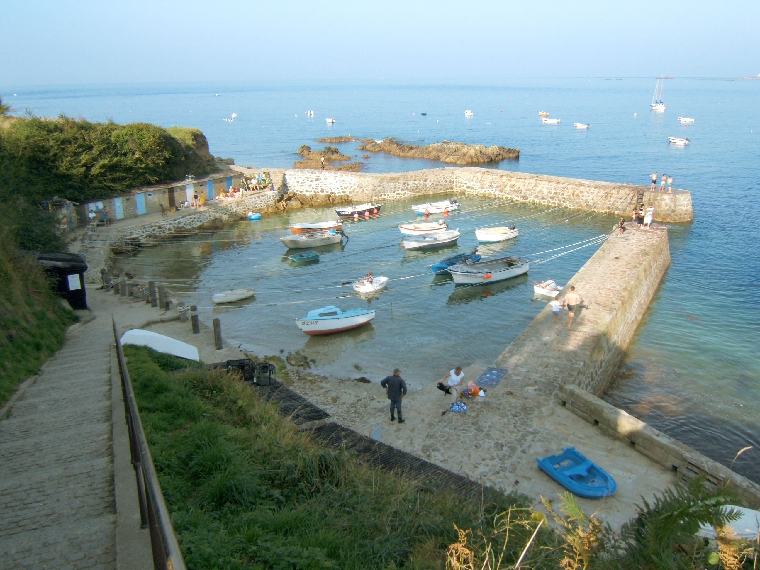 Port-Racine dans le Cotentin, un soir d'été.